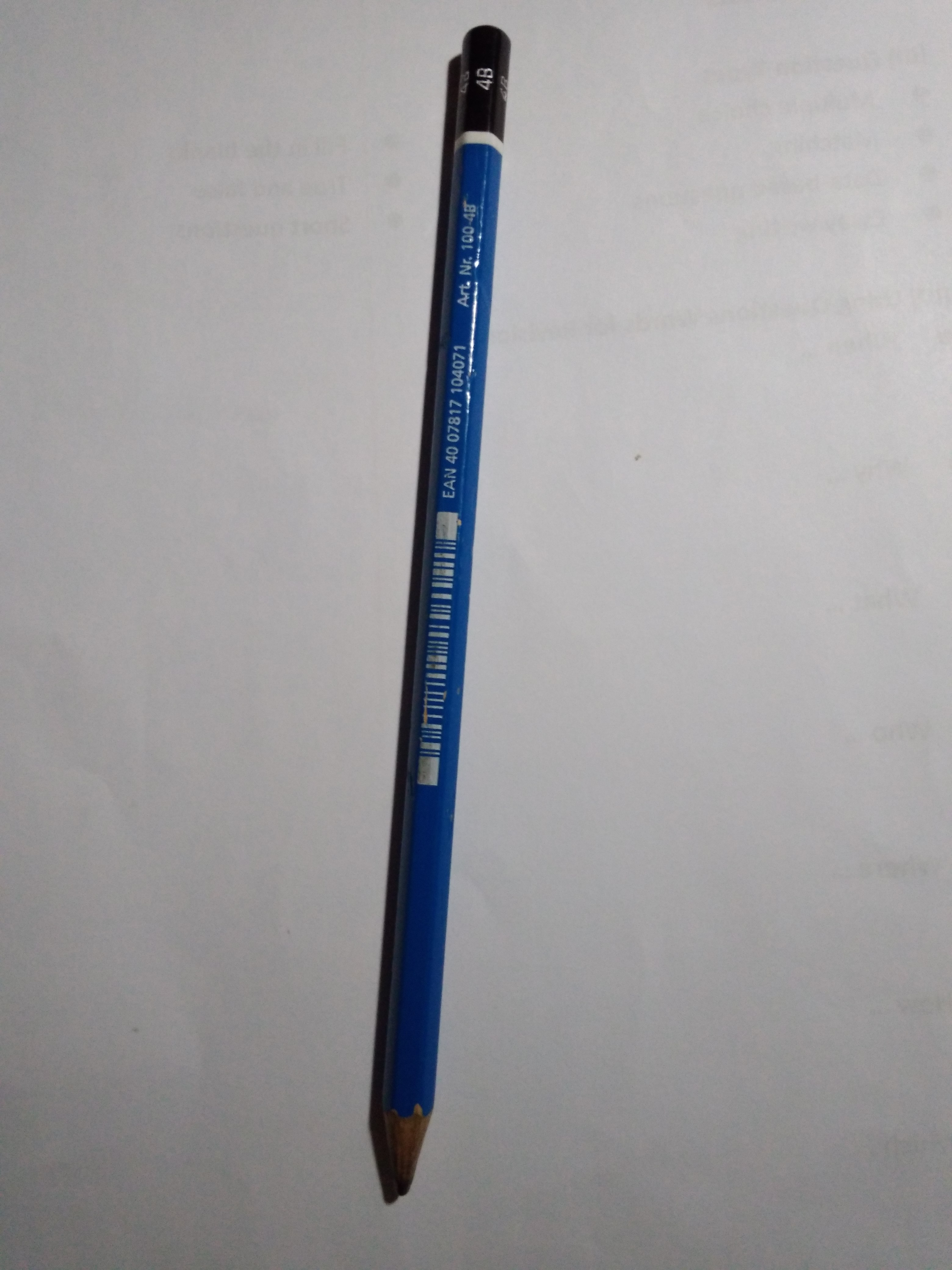 four b pencil